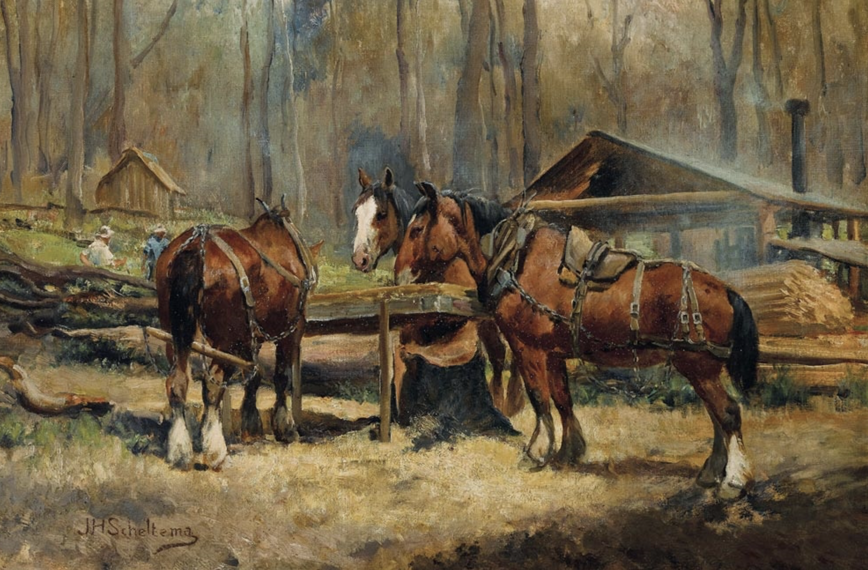 "Draught Horses Resting" door Jan Hendrik Scheltema